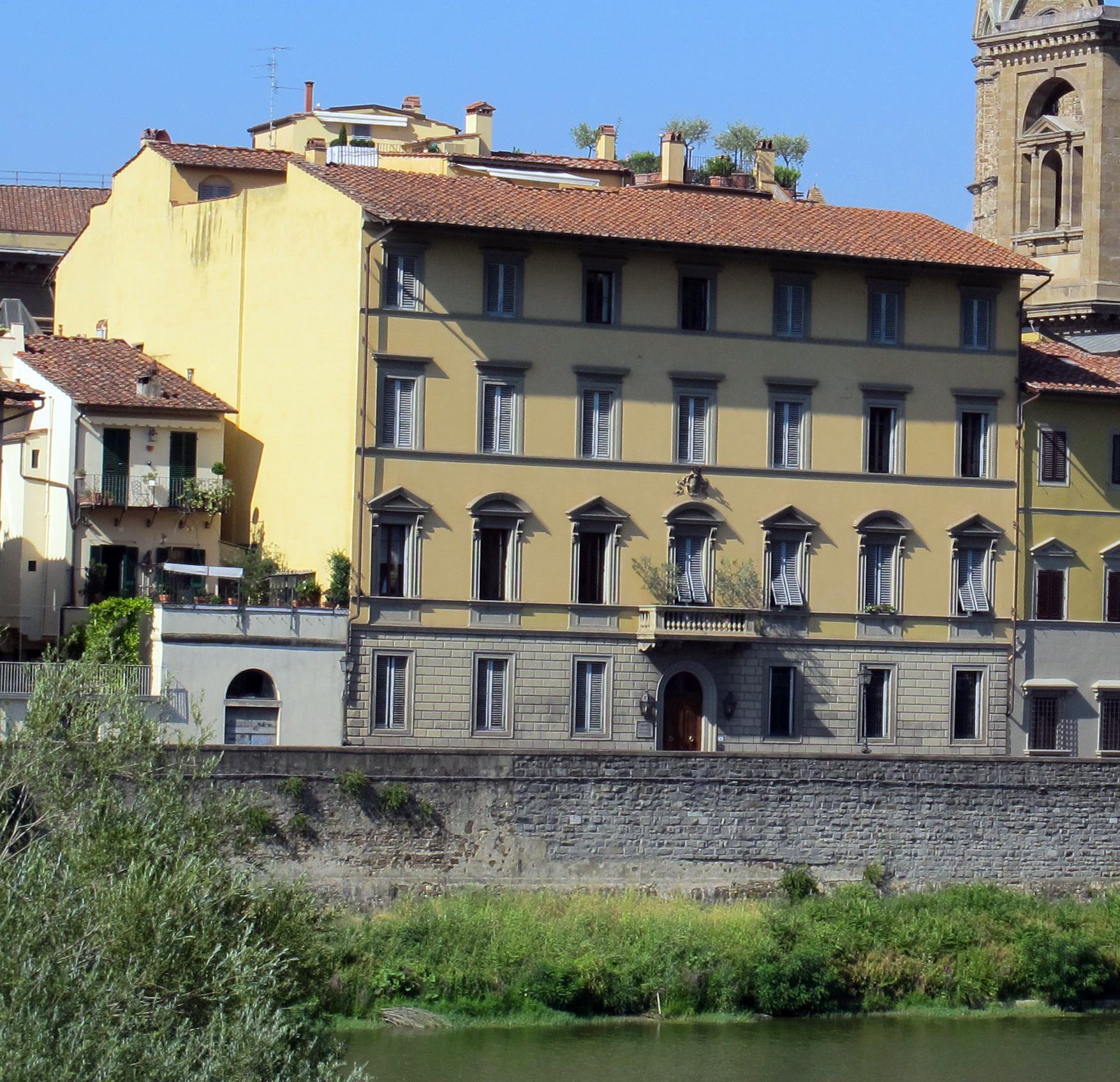 Lungarno delle grazie, palazzo jennings riccioli